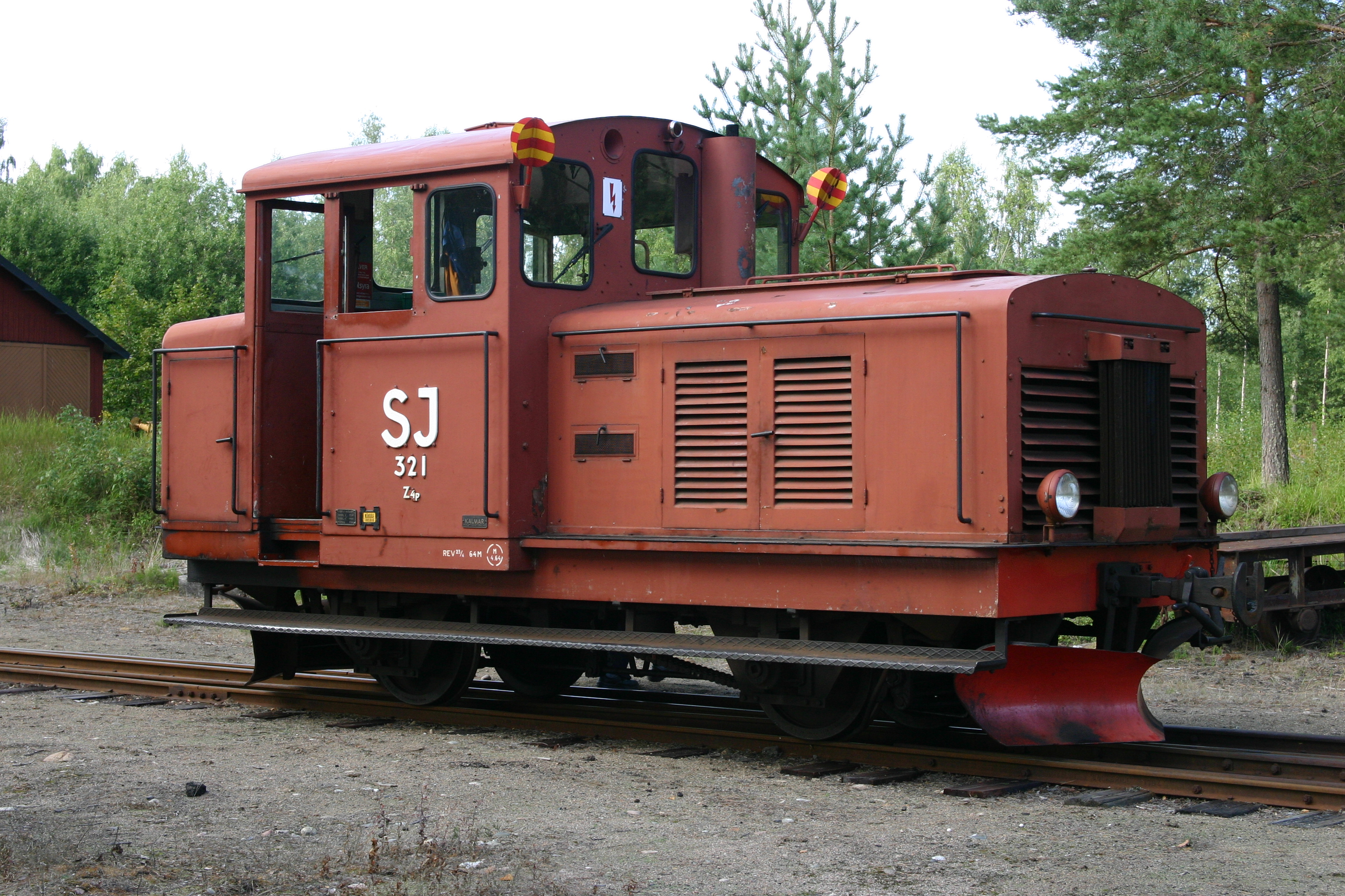 Diesellokomotive Z4p 321 der SJ in Jädraås 16.08.08